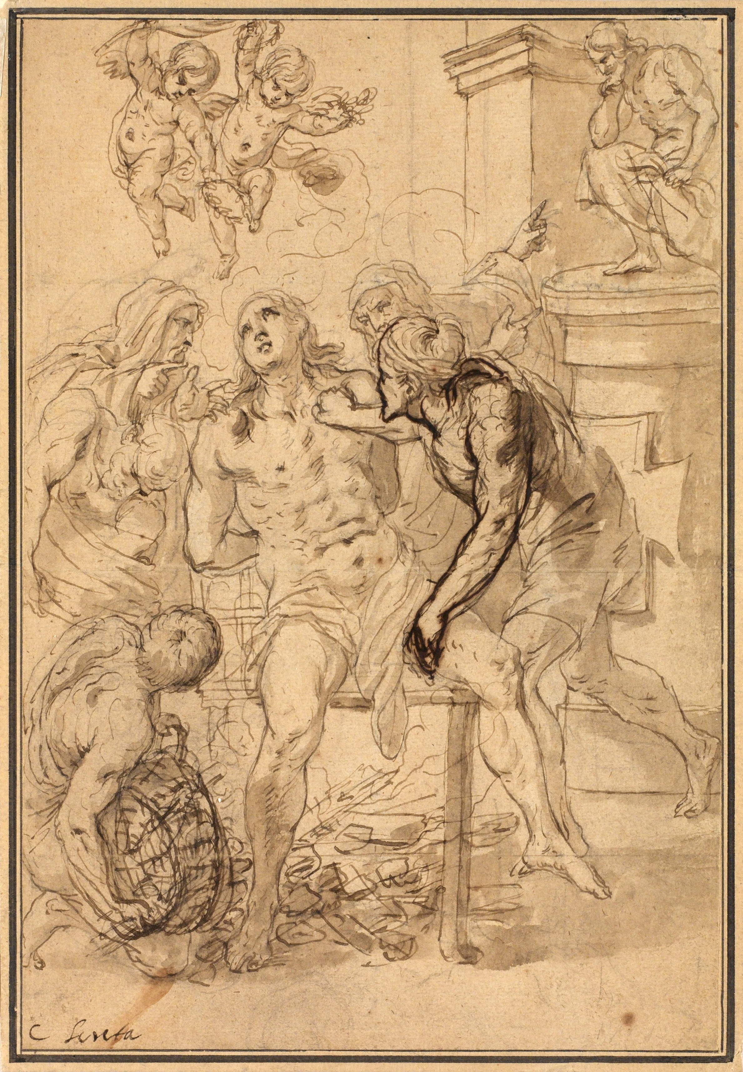 Karel Škréta: Umučení sv. Vavřince (před 1650), kresba perem a štětcem bistrem na hnědavém papíře, 311x215 mm, Národní galerie v Praze